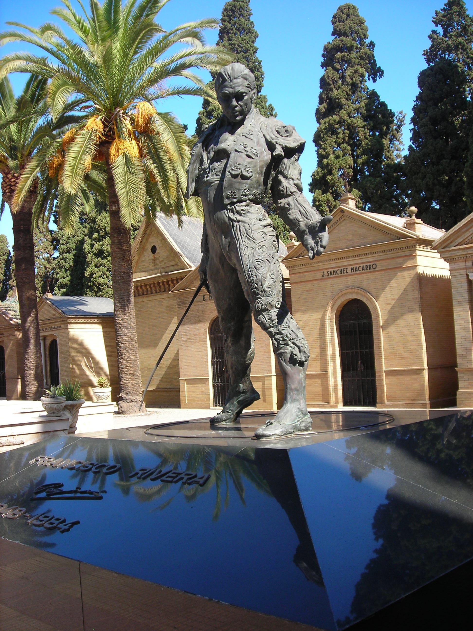 Mausoleo del torero Francisco Rivera, "Paquirri". Cementerio de San Fernando de Sevilla.